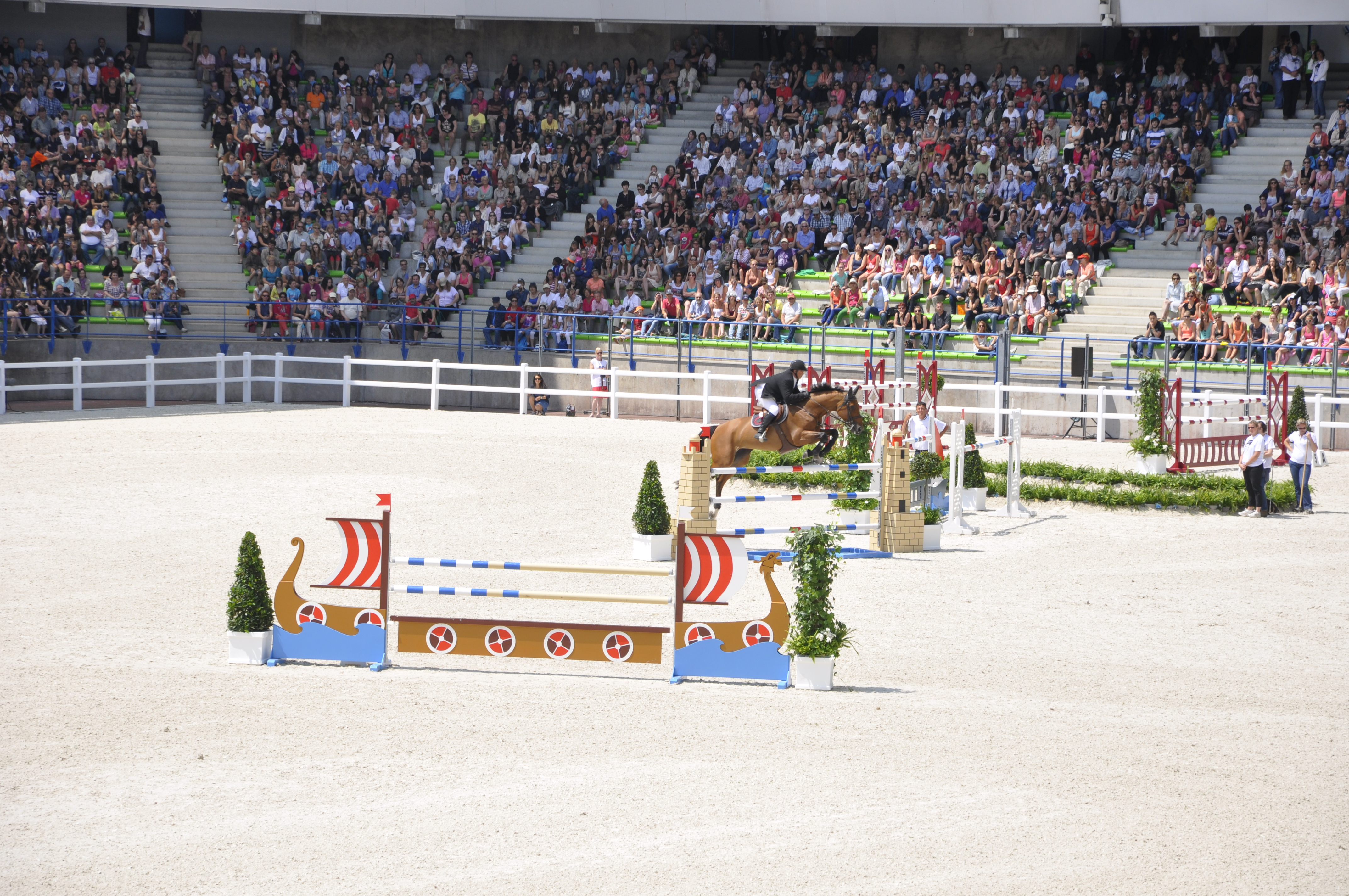 concours préparatoire de saut d'obstacle au stade Michel d'Ornano le 25 juin 2014